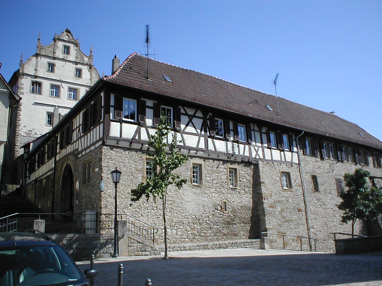 Wirtschaftshof des Greckenschlosses in Bad Friedrichshall-Kochendorf